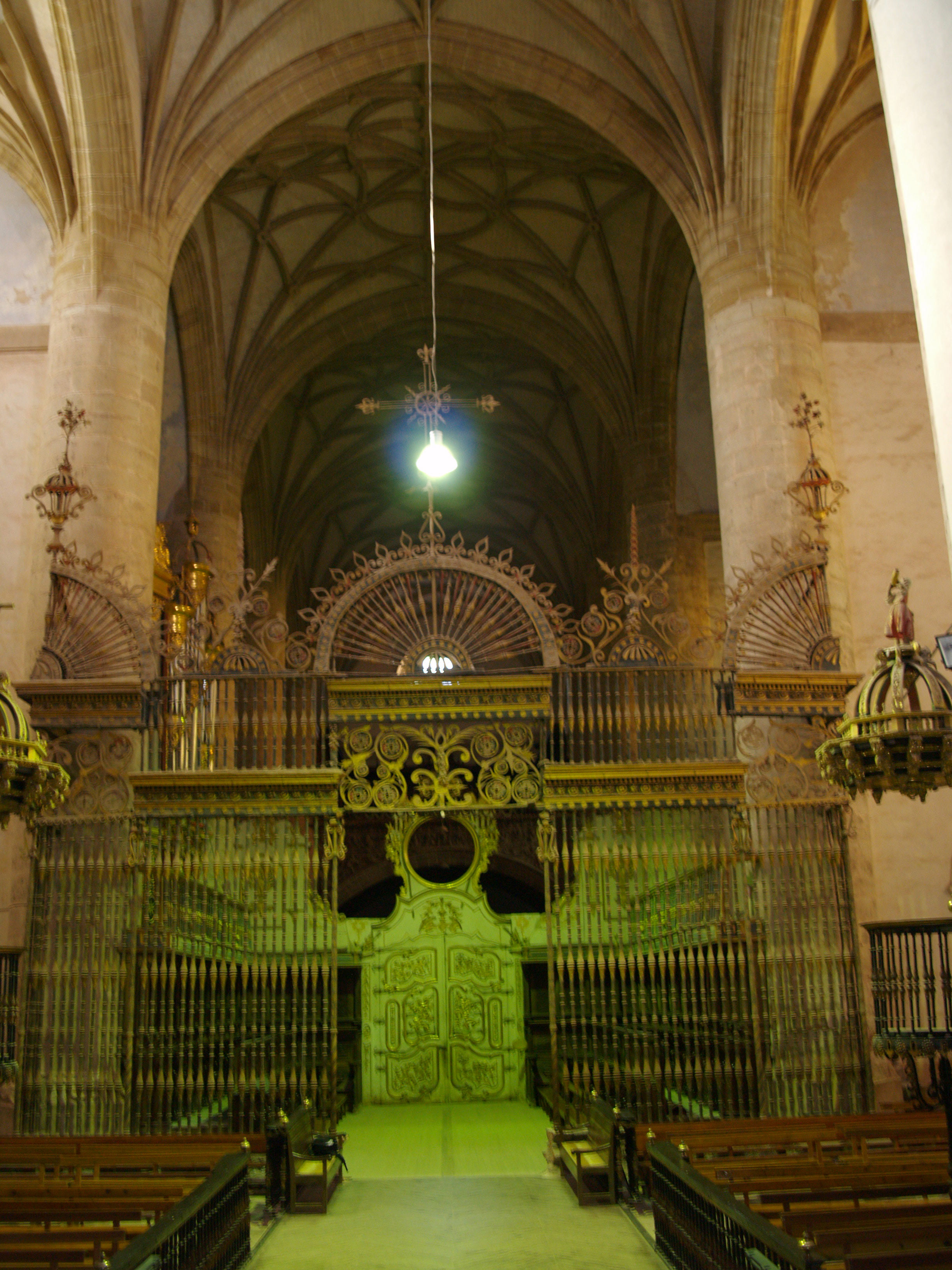 Iglesia del Monasterio de Yuso. San Millán de la Cogolla, La Rioja. Patrimonio de la Humanidad